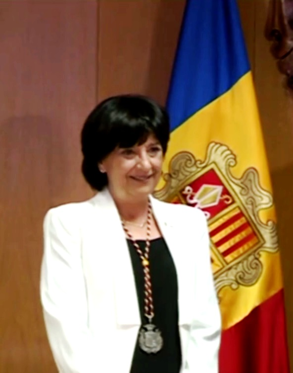 Maria Rosa Ferrer Obiols, en una fotografía tomada por el publicante en motivo de la visita a Andorra la Vella del Copríncipe Francés François Hollande